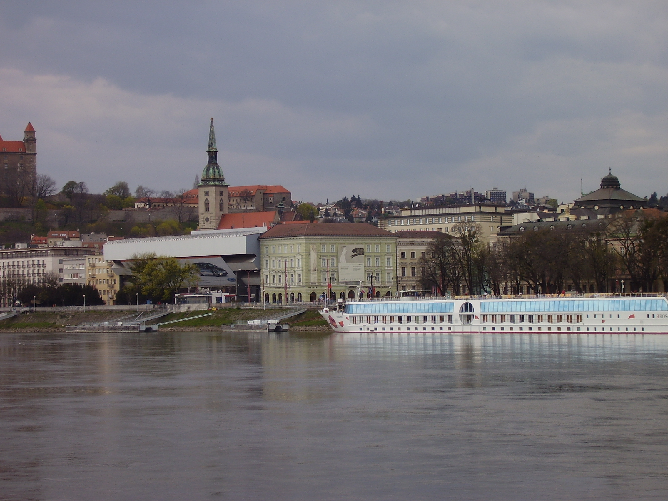 Bratislava riverfront